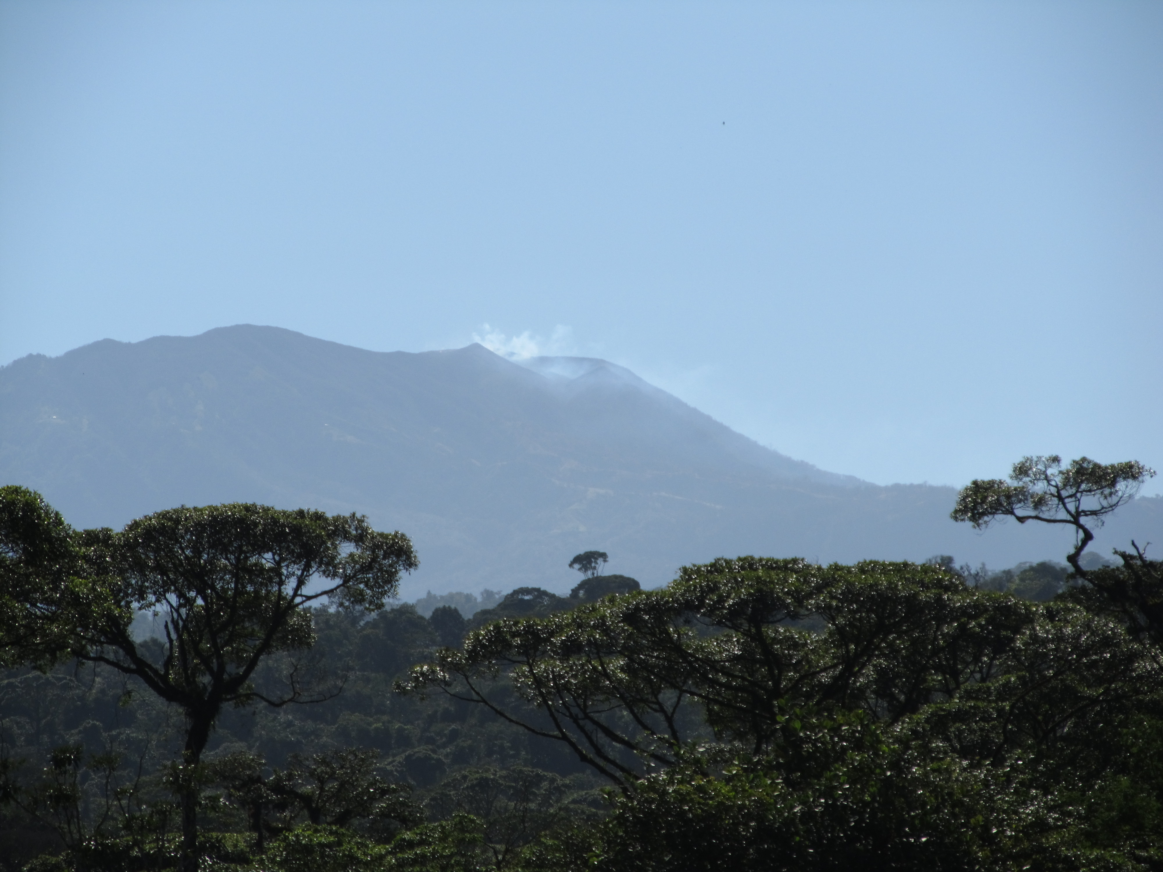 Volcán Turrialba visto desde el canopy de Rainforest Adventures cerca del Parque Nacional Braulio Carrillo, Costa RicaEsperanto: Vulkano Turrialba vidita el kanope-vojo de la entrepreno Rainforest Adventures, proksime de la Nacia Parko Braulio Carrillo, Kostariko